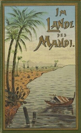 Karl May Im Lande des Mahdi